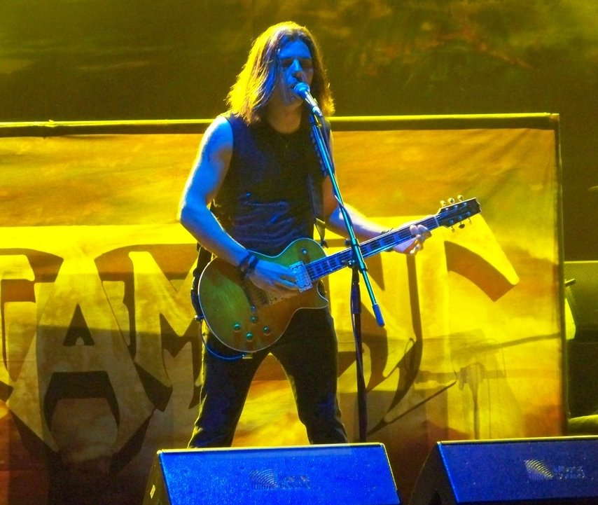 Testament at Metal Camp, Slovenia 2009